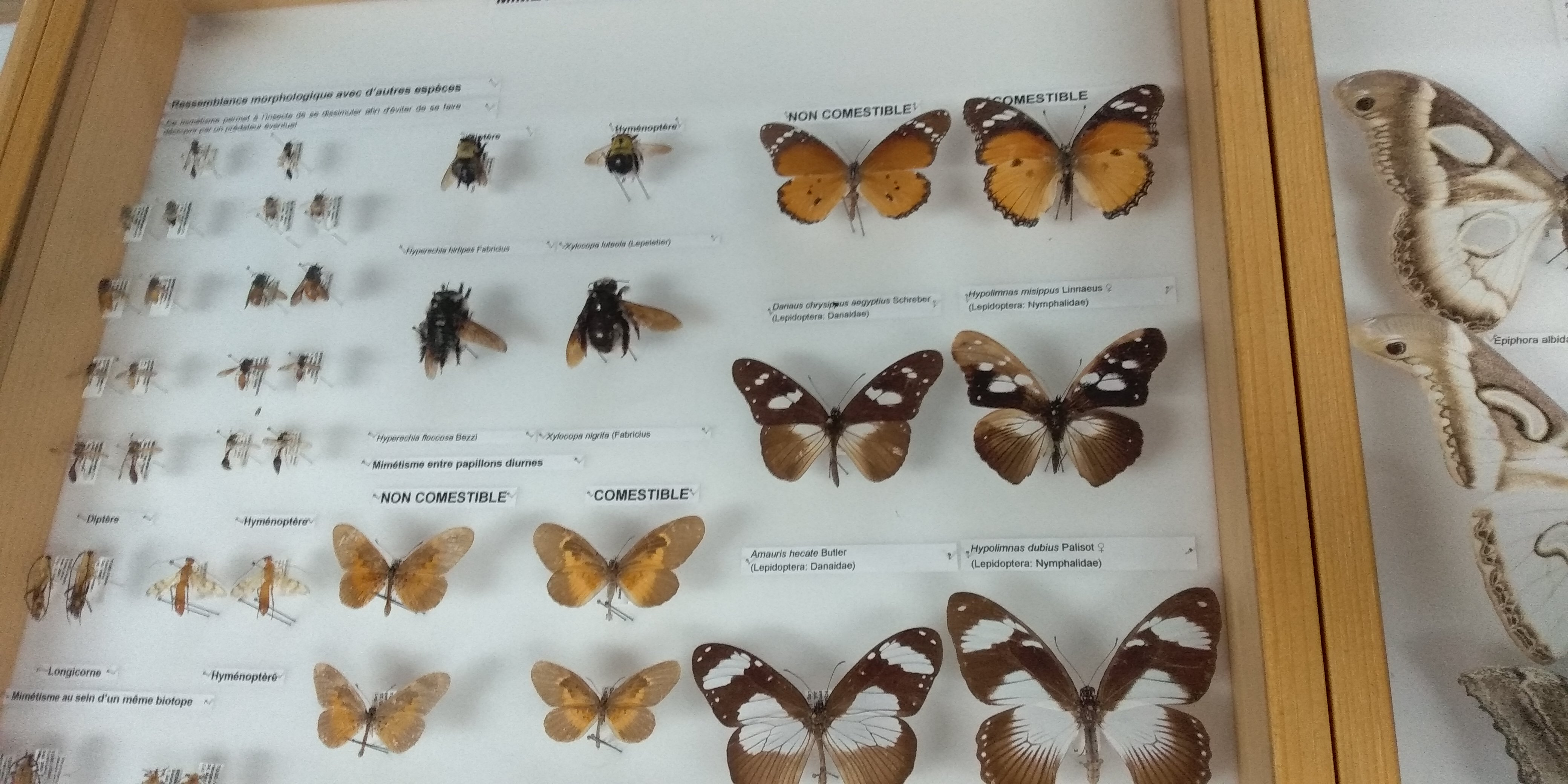 Le musée de l'Institut International pour l'Agriculture Tropicale (IITA)